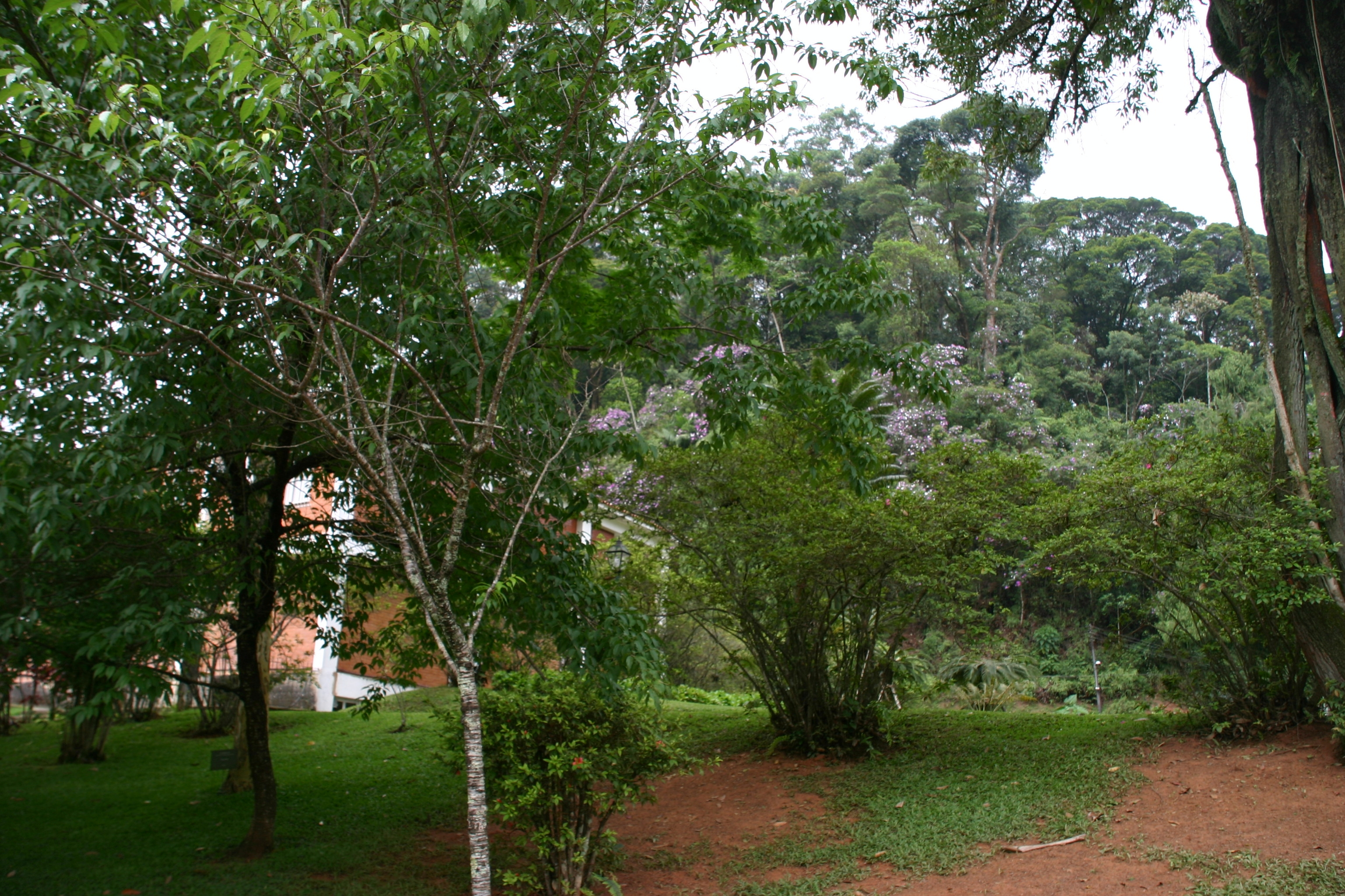 Parc municipal de Petrópolis, Etat deÉtat de Rio de Janeiro Brésil.